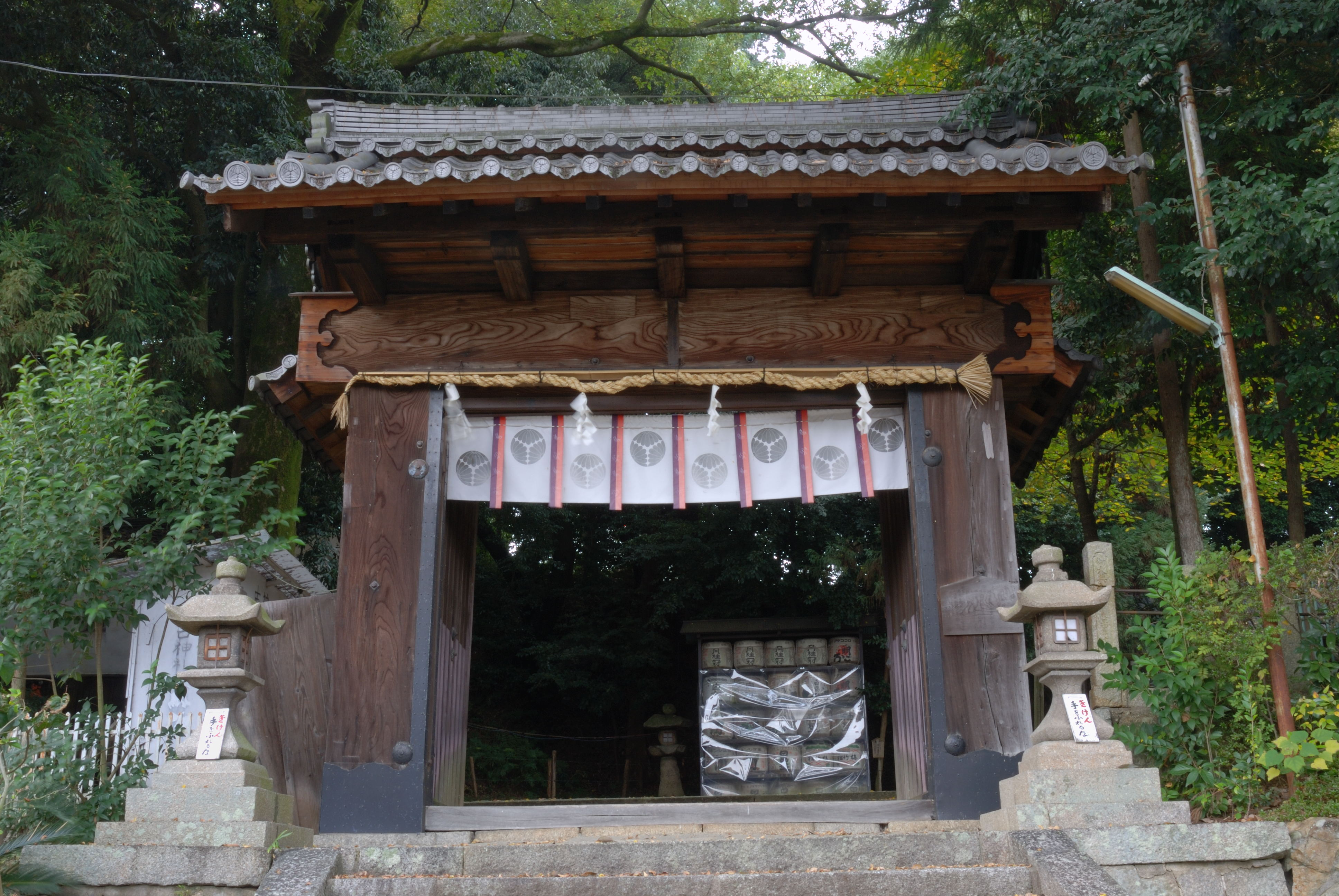 Zeze castle kuromon